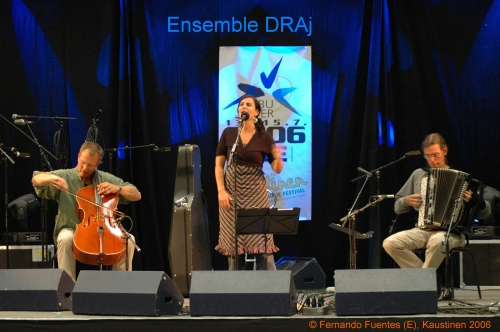 Ensemble DRAj beim EBU-Festival 2006 in Kaustinen (Finnland)